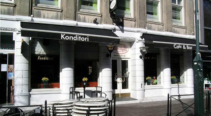 Erichsens konditori, Nordre gate, Trondheim.